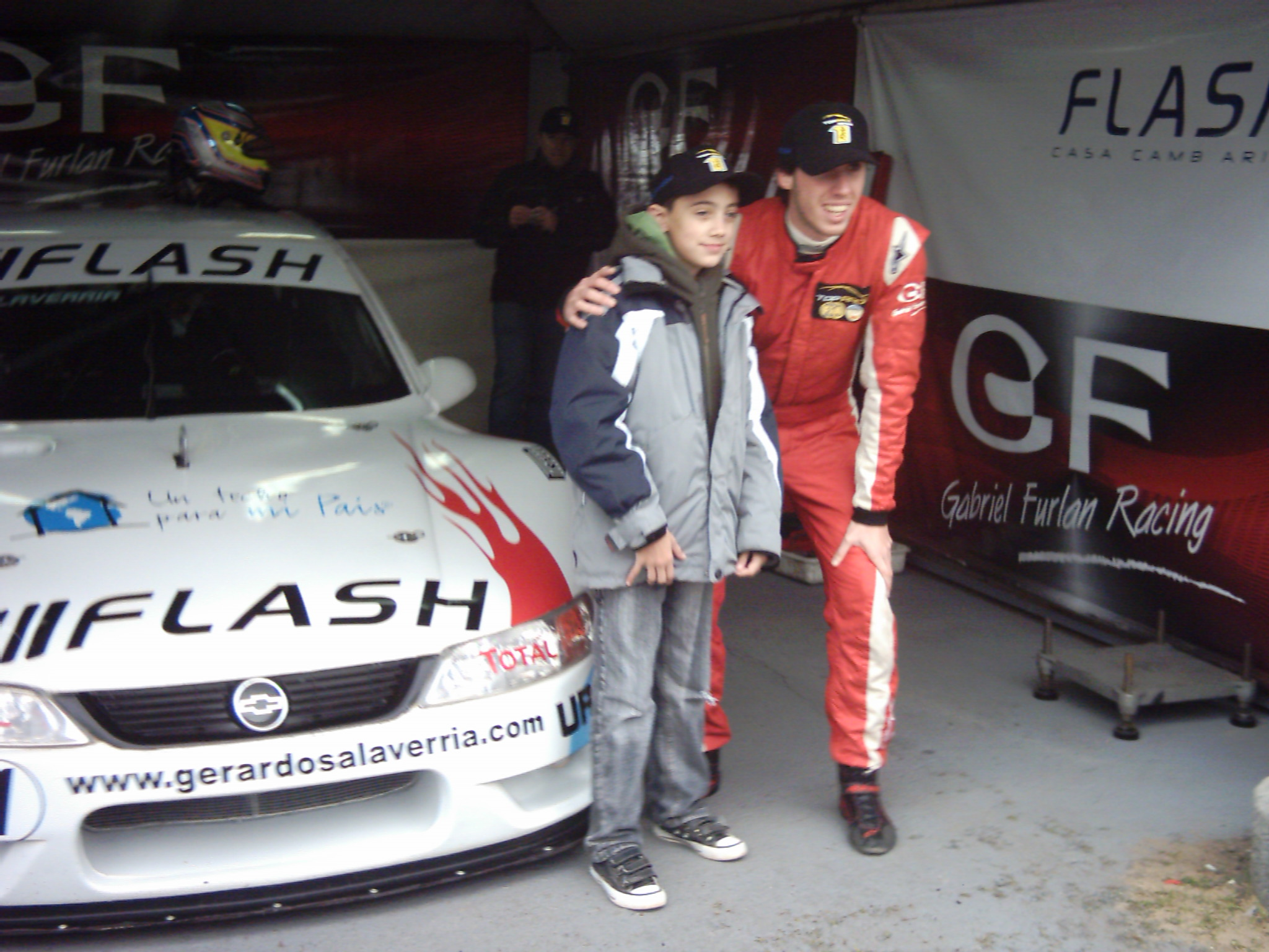 El Piloto uruguayo de Top Race Series, Gerardo Salaverria junto a un fanático.